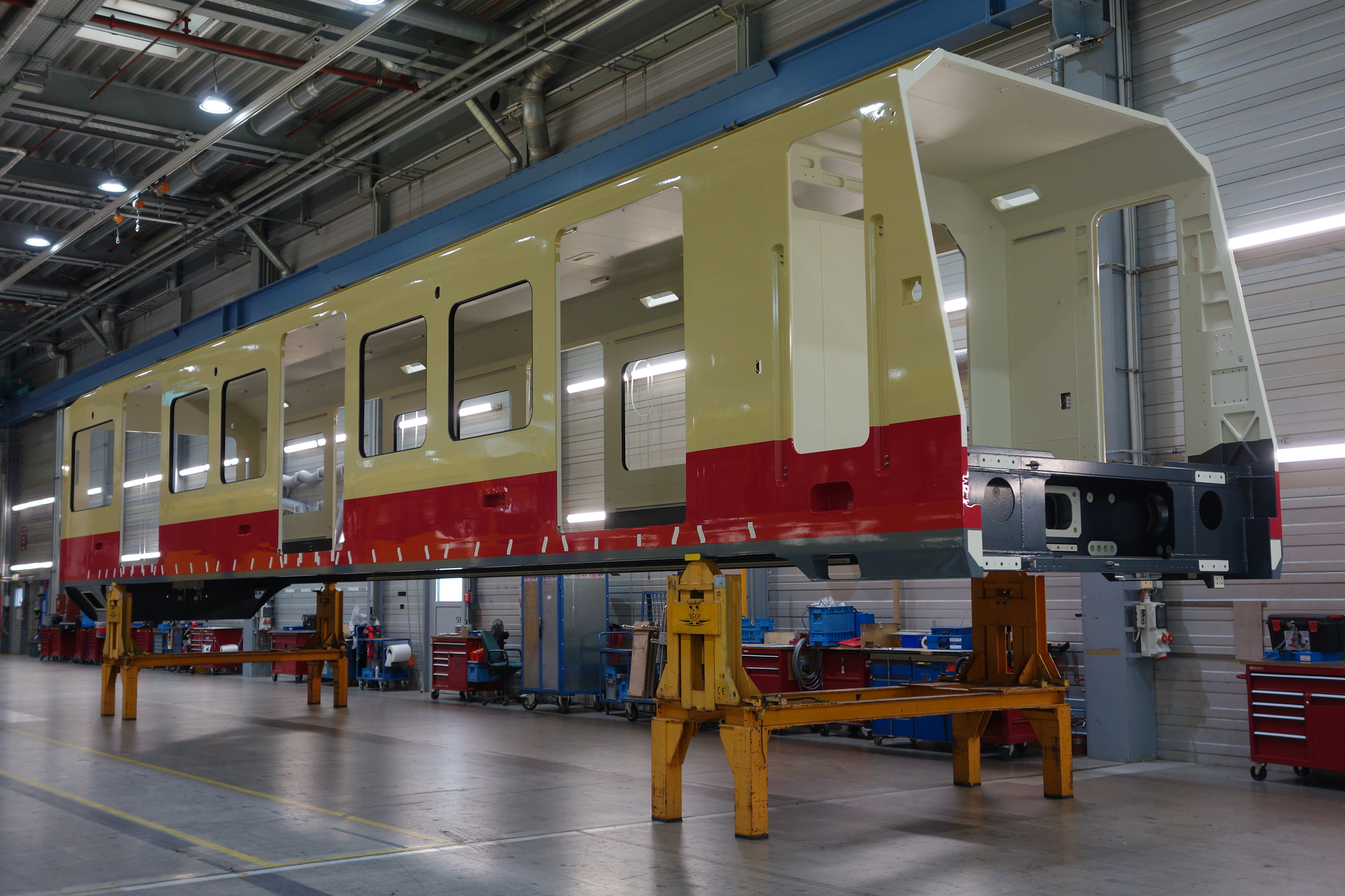 Erster vorgefertigter Wagenkasten (Kopfwagen eines vierteiligen Zuges BR 484) der DB-Baureihe 483/484 für die S-Bahn Berlin im Stadler-Werk Berlin-Pankow